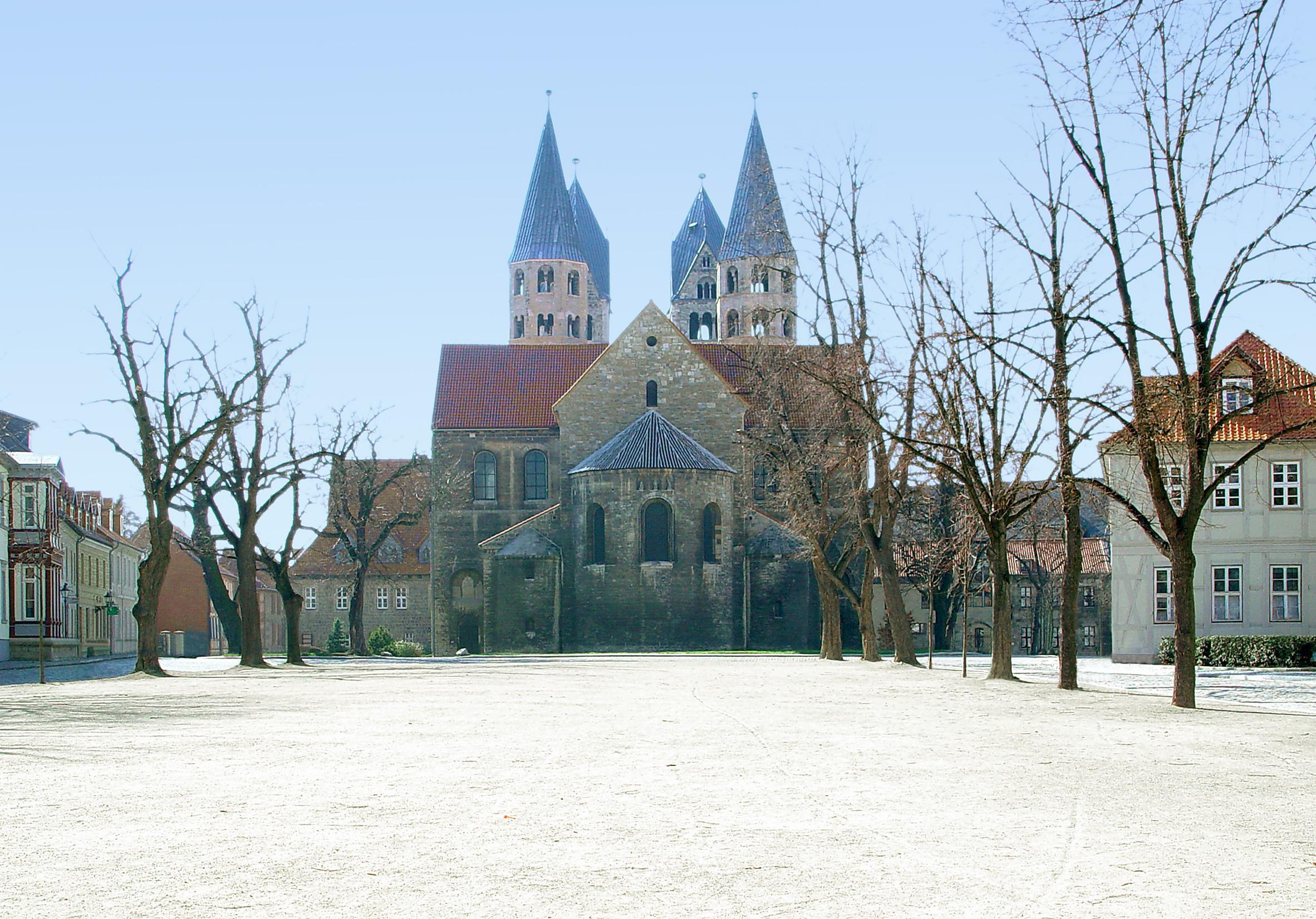 Liebfrauenkirche in Halberstadt Aufnahmedatum: 2. April 2005 Fotograf: ArtMechanic